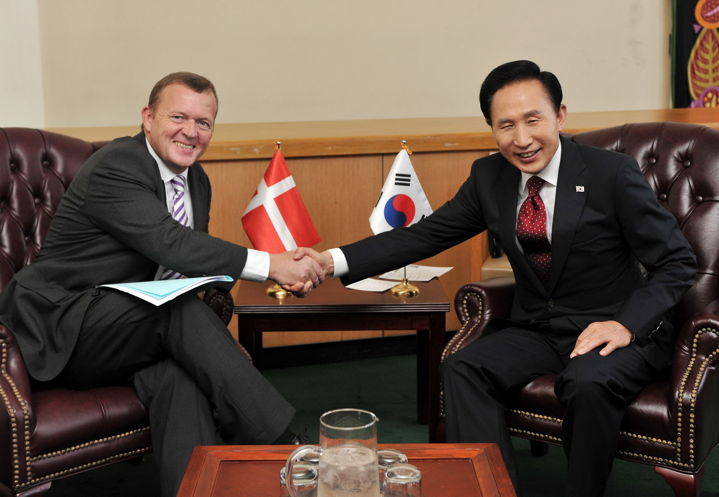 Korea-Denmark summit